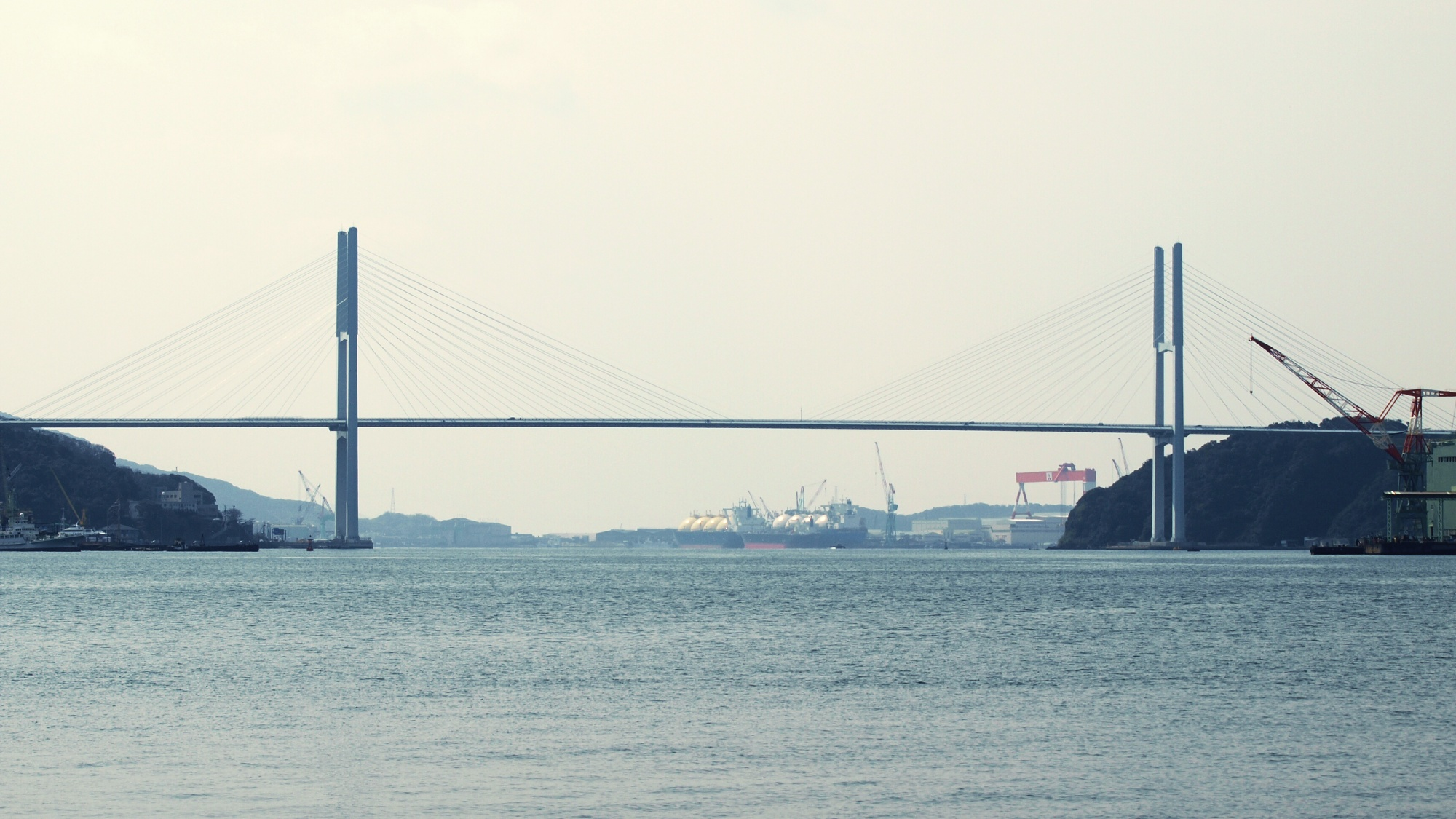 長崎港より女神大橋を望む。2009年3月2日撮影